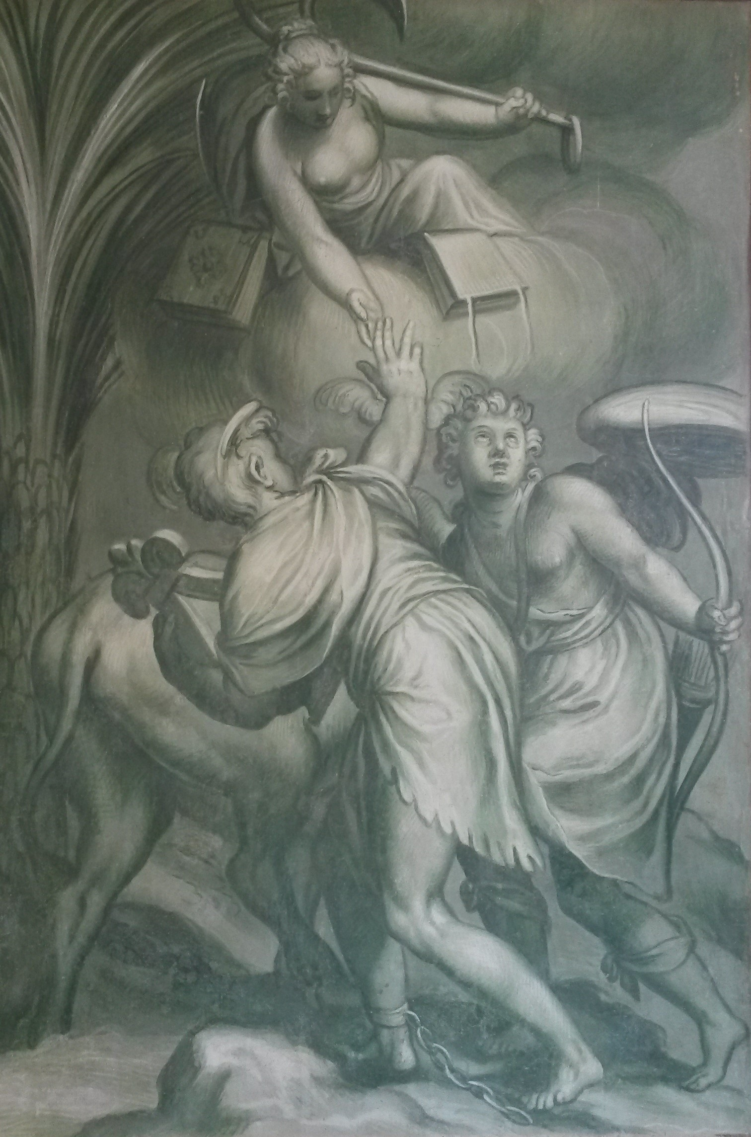 Paolo Farinati, "Latona con i figli Apollo e Diana", 1590 circa, affresco (restaurato nel 2016).